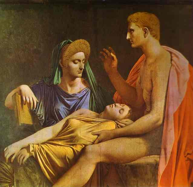 Tu Marcellus erisdetail